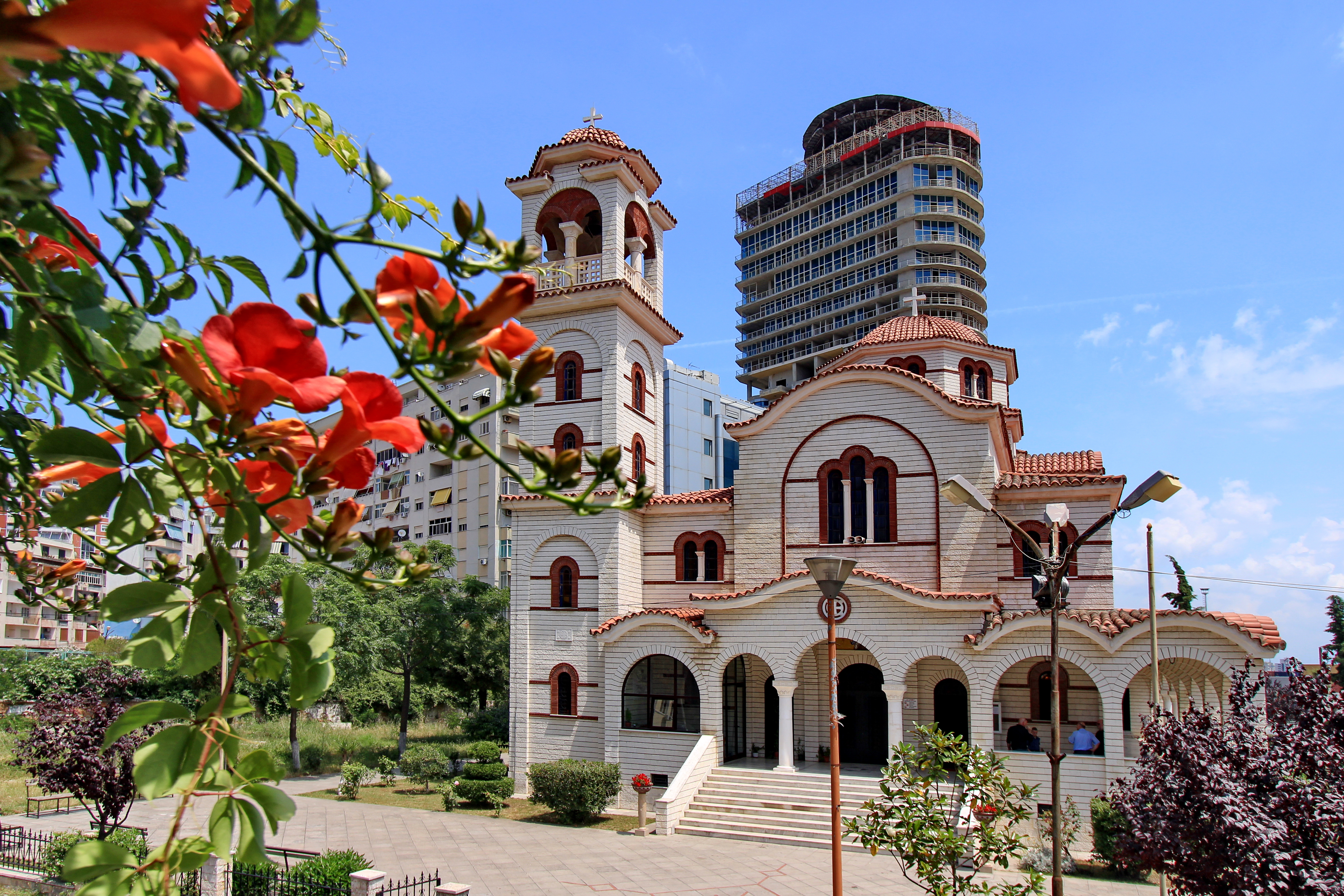 Amfiteatri i Durrësit